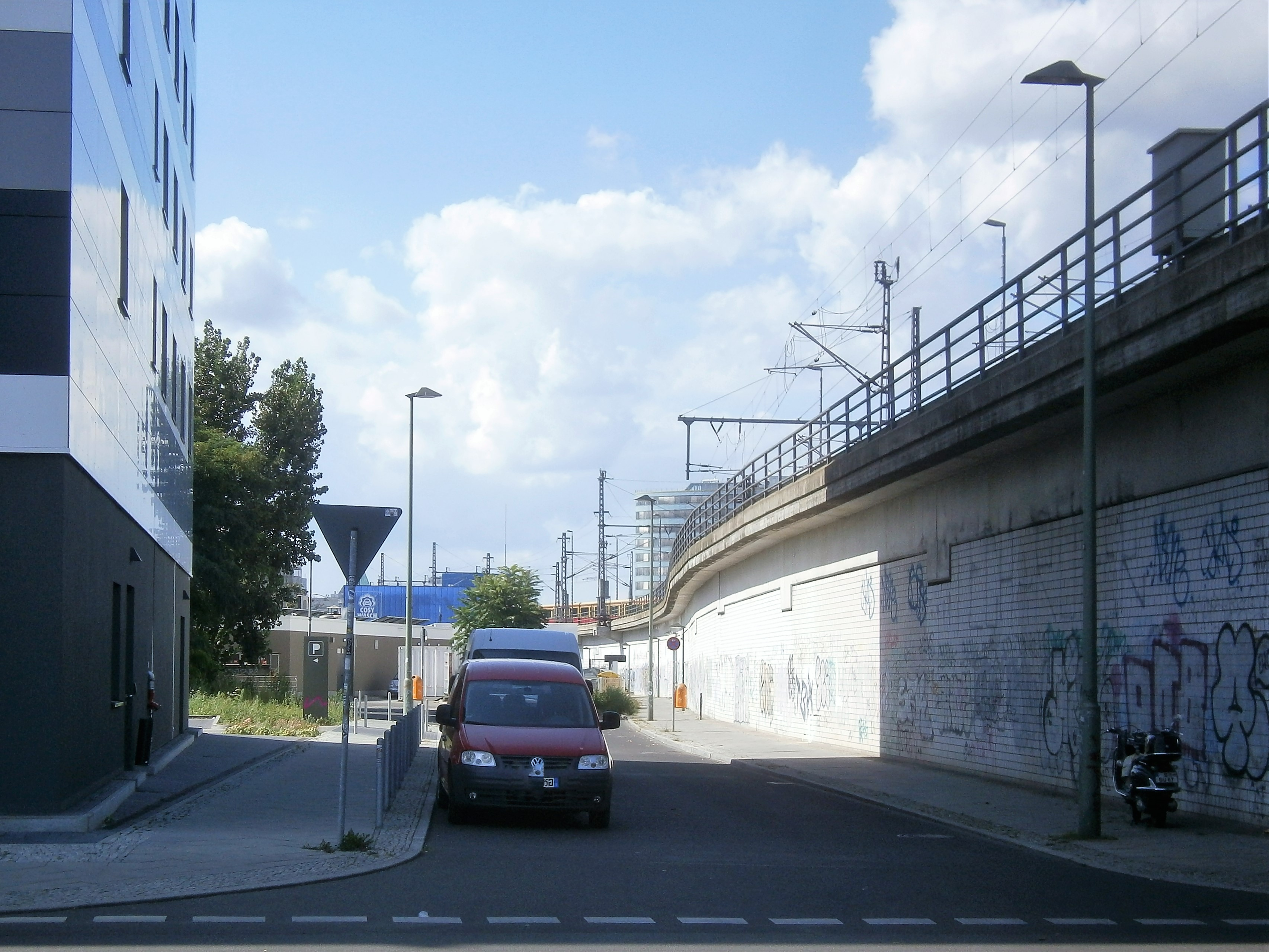 Die Andreasstraße ist ein Straße im Berliner Bezirk Friedrichshain-Kreuzberg, Ortsteil Friedrichshain zwischen Holzmarkstraße/ Stralauer Platz (nahe Ostbahnhof) und der Karl-Marx-Allee. Blick in die Am Ostbahnhof westlich der Andreasstraße zwischen Hotel und Bahn, vormals lag hier die Breslauer Straße.